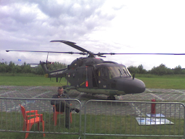 A Dutch navy (Koninklijke Marine) Westland Lynx Mk.27 helicopter.